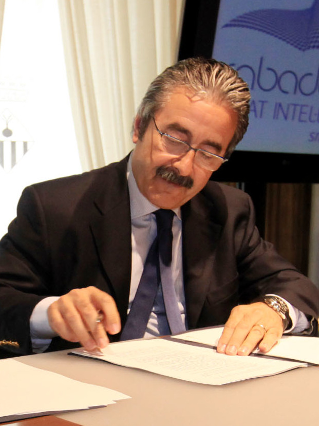 L'Alcalde Manuel Bustos i el director general de Telefonica Kim Faura signant el conveni